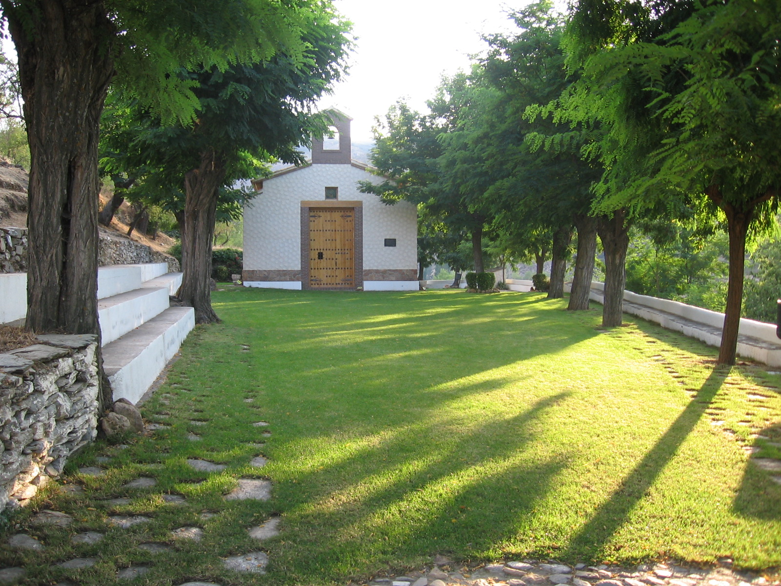 Ermita del Santo Cristo del Bosque, Bacares, España.